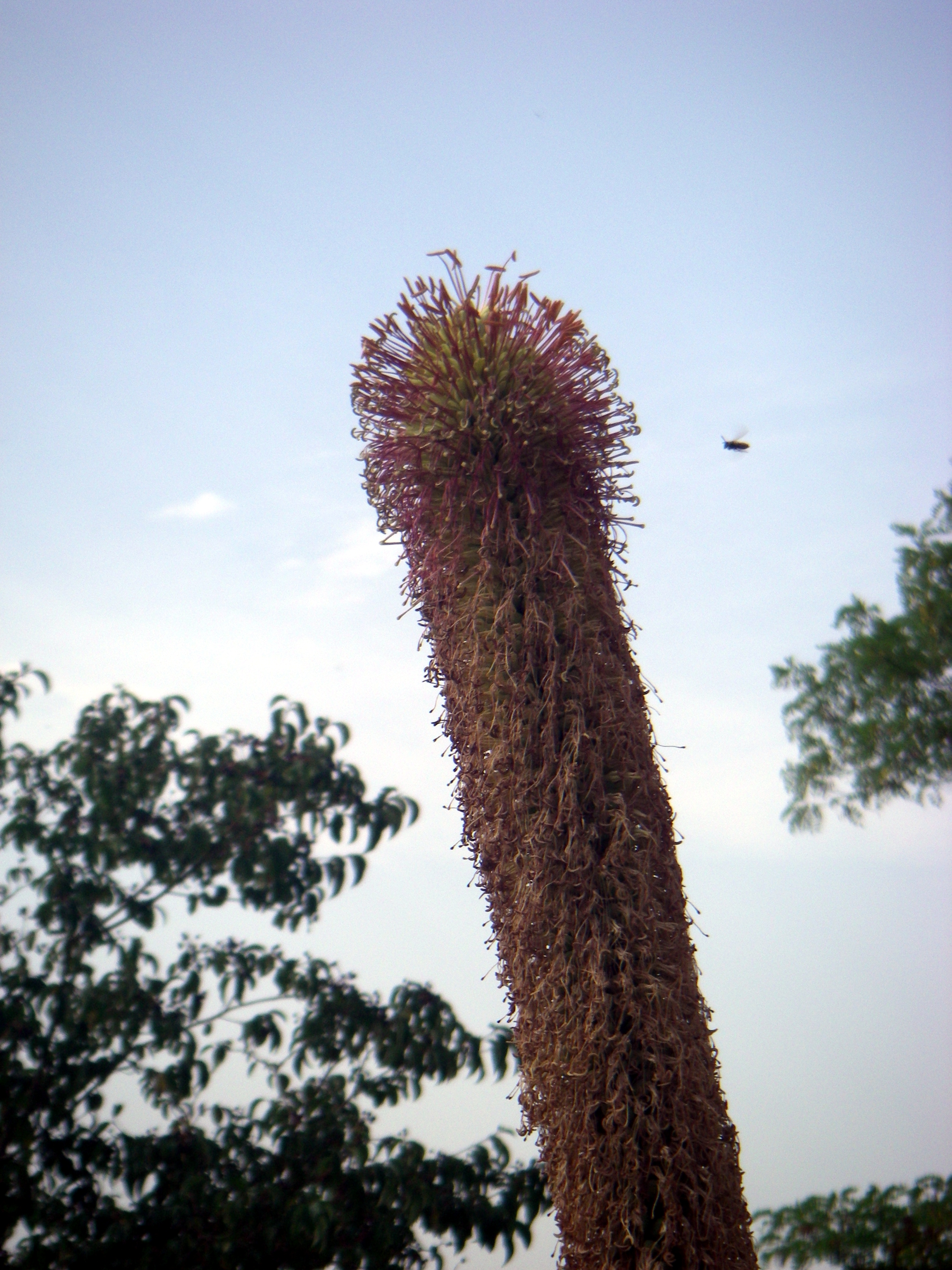 Fleurs d'agave victoriae reginae